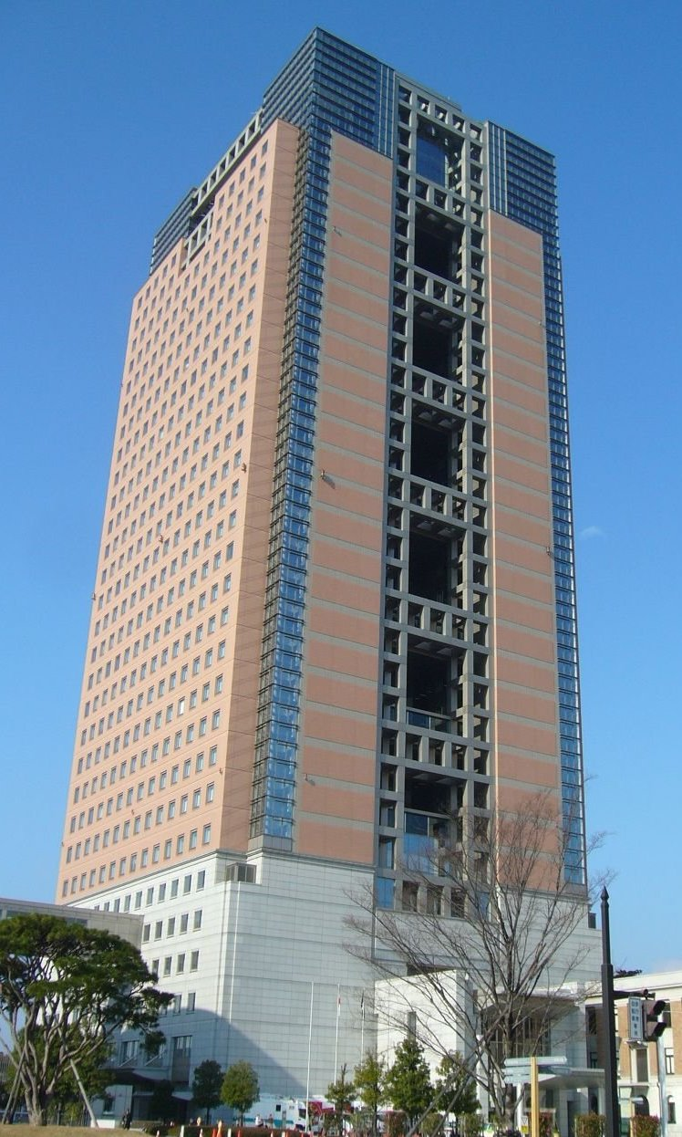 群馬県庁 新庁舎 2006年12月 Bakkai撮影 Category:官公庁の画像 Category:群馬県の画像 Gunma Kencho Building. Gunma, Japan